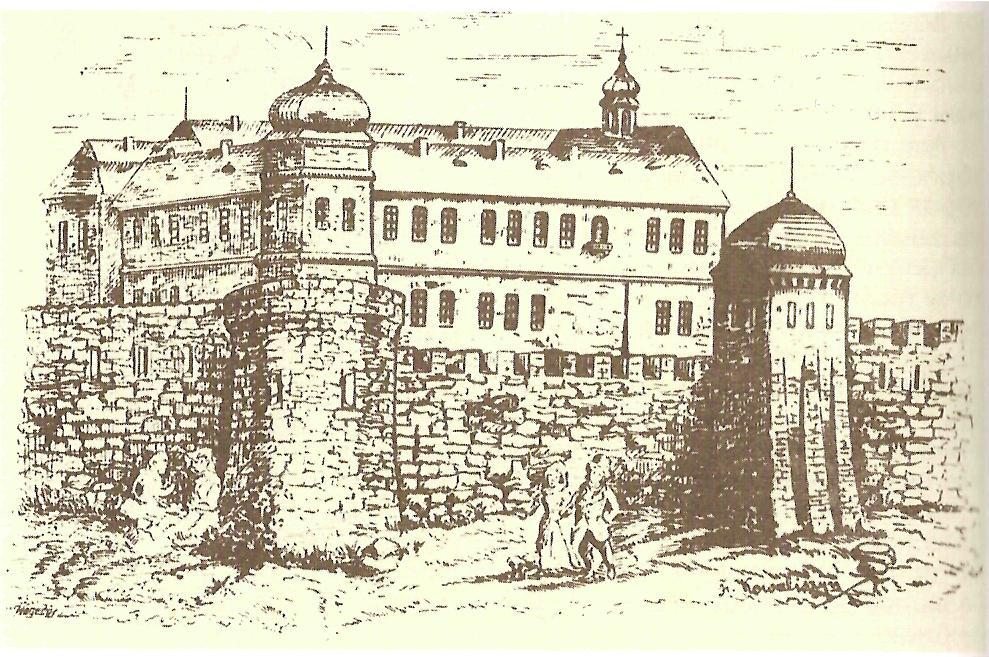 Низький замок у Львові. Малюнок замку.